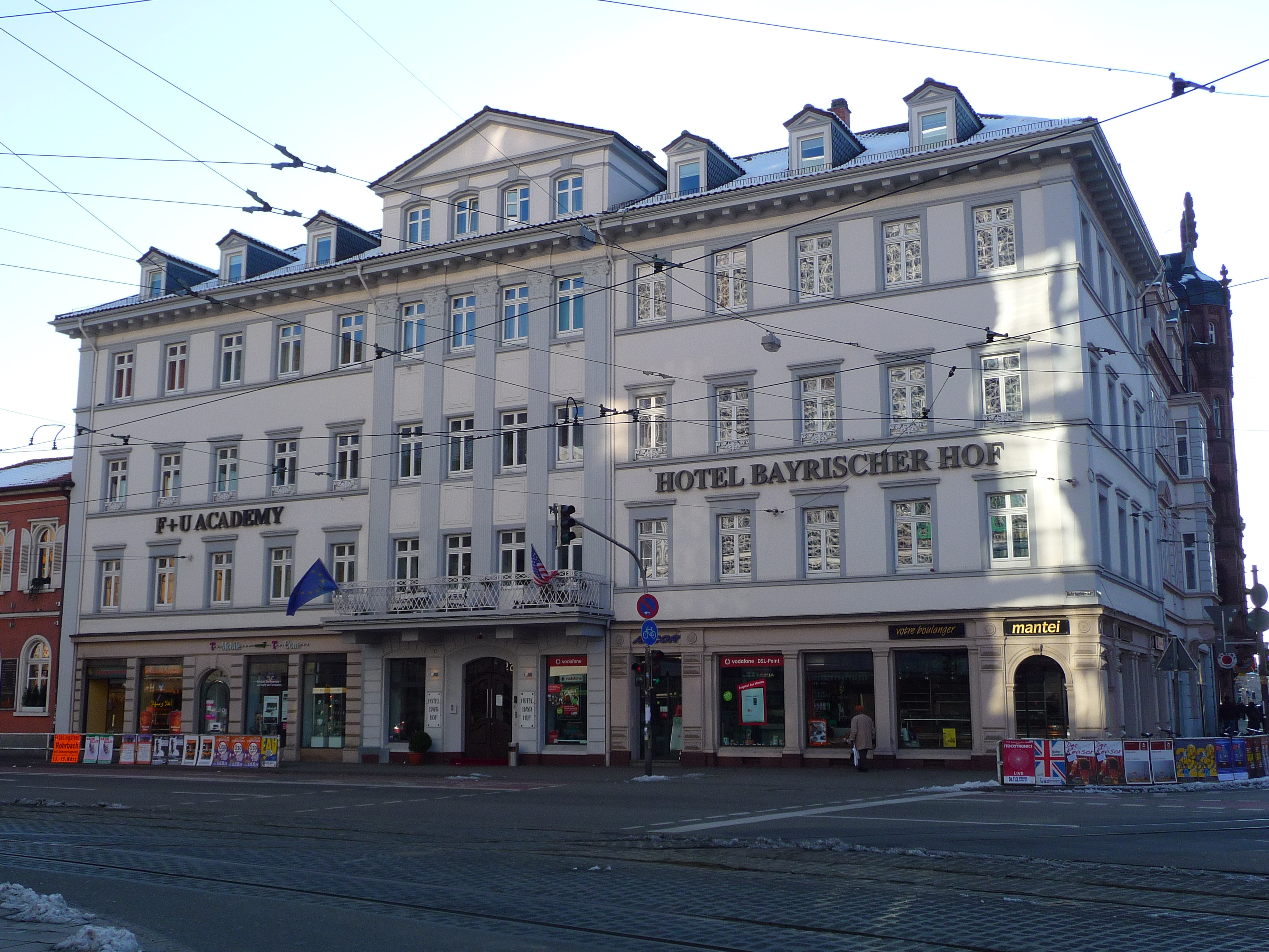 Template:Hotel "Bayrischer Hof" in Heidelberg (Baden-Württemberg, Deutschland)